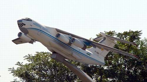 Réplique de l'avion Il-76 à l'entrée de GAO TAPOiCH.